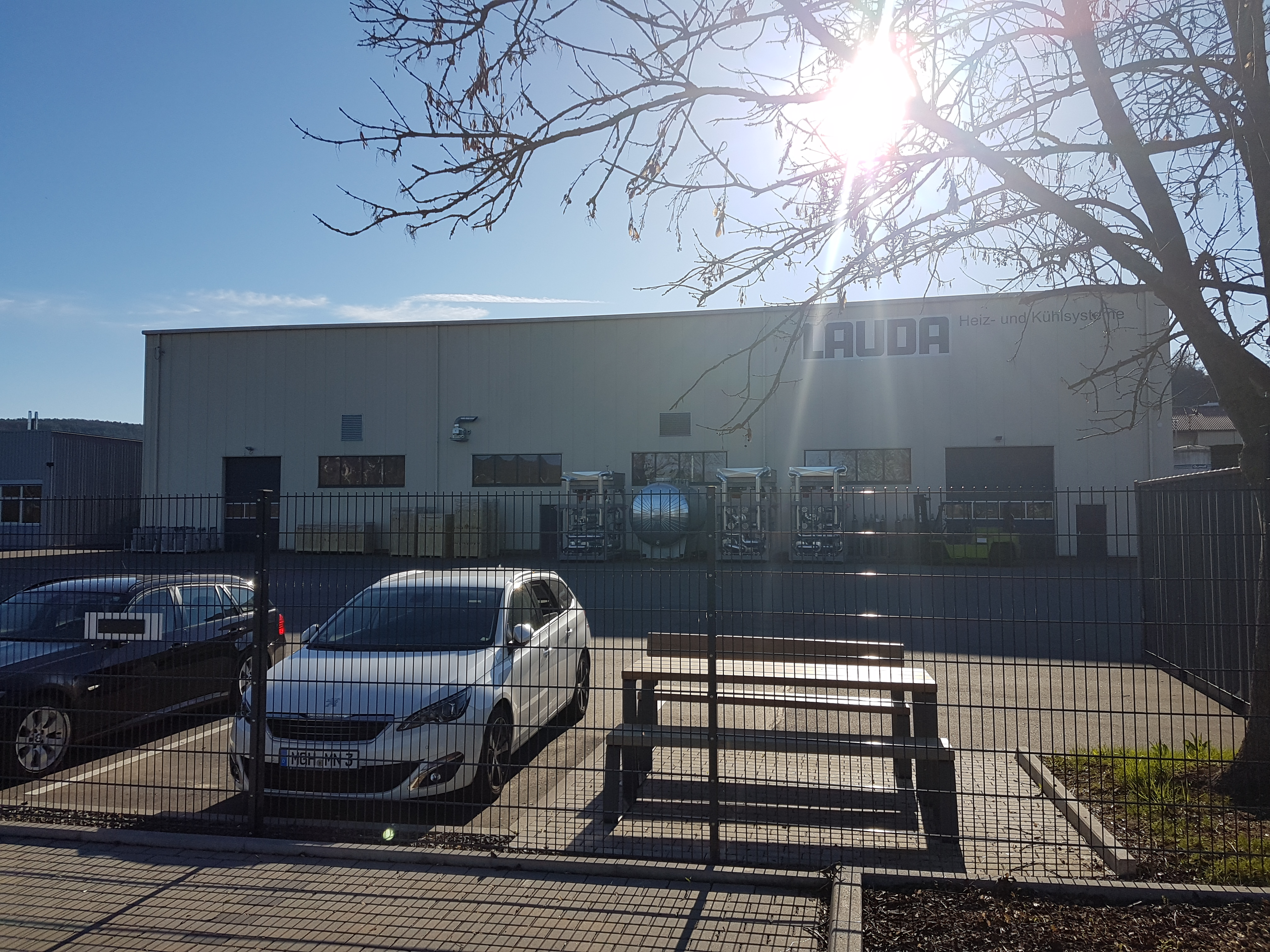 Lauda Dr. R. Wobser GmbH & Co. KG